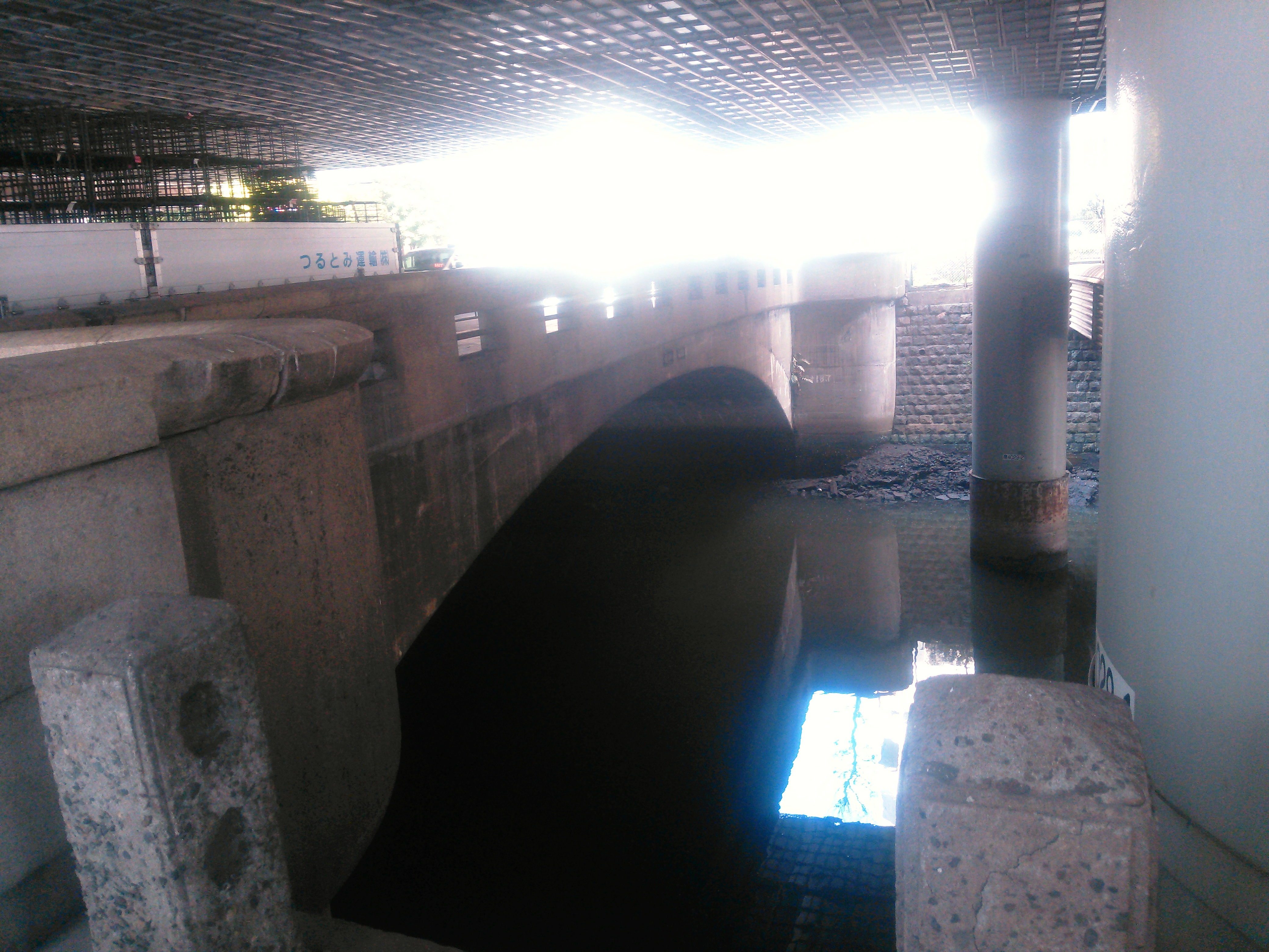 東京都千代田区、日本橋川に架かる鎌倉橋